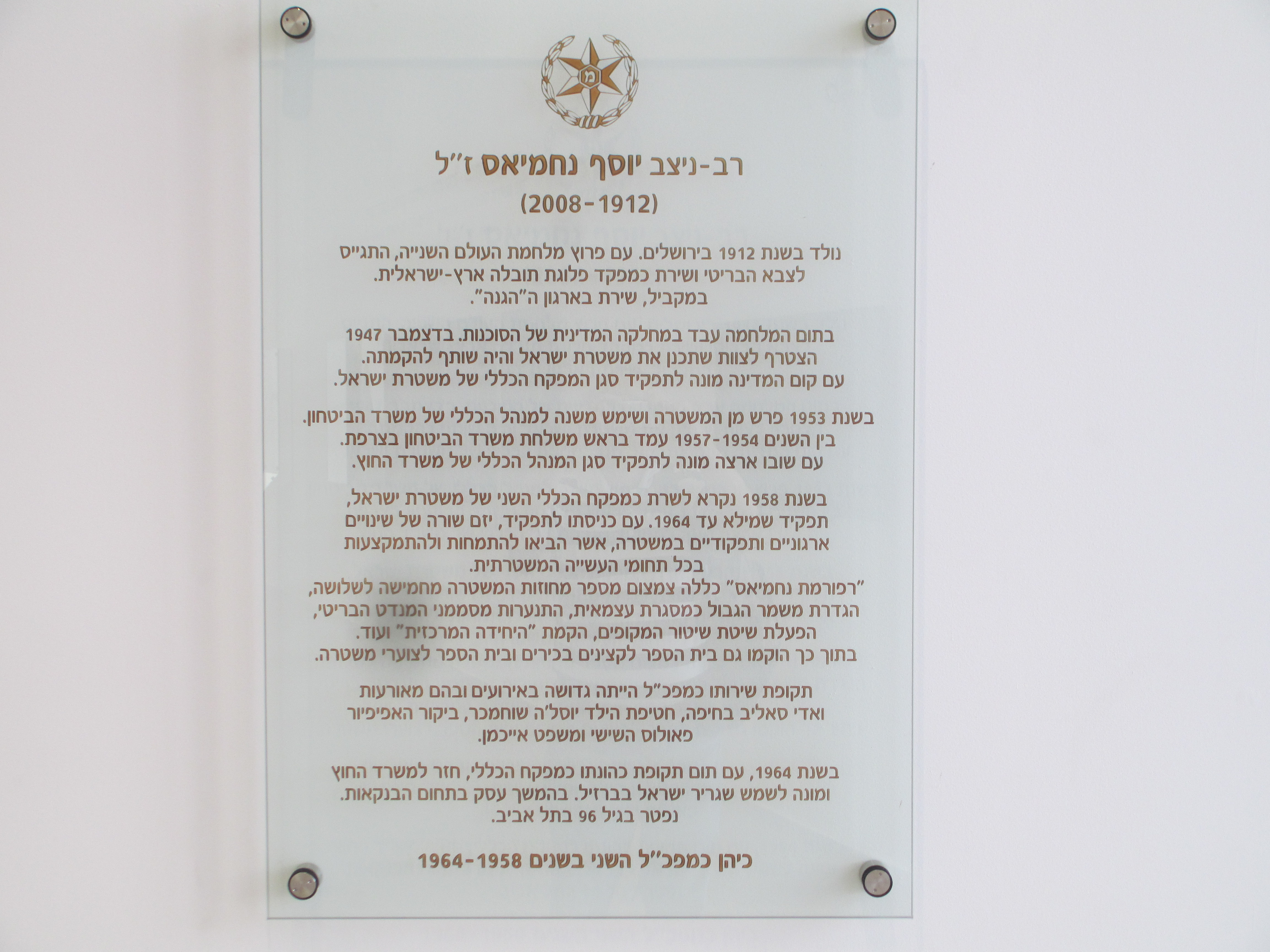 לוחית זיכרון ליוסף נחמיאס במוזיאון מורשת משטרת ישראל בבית שמש, הקרוי על שמו